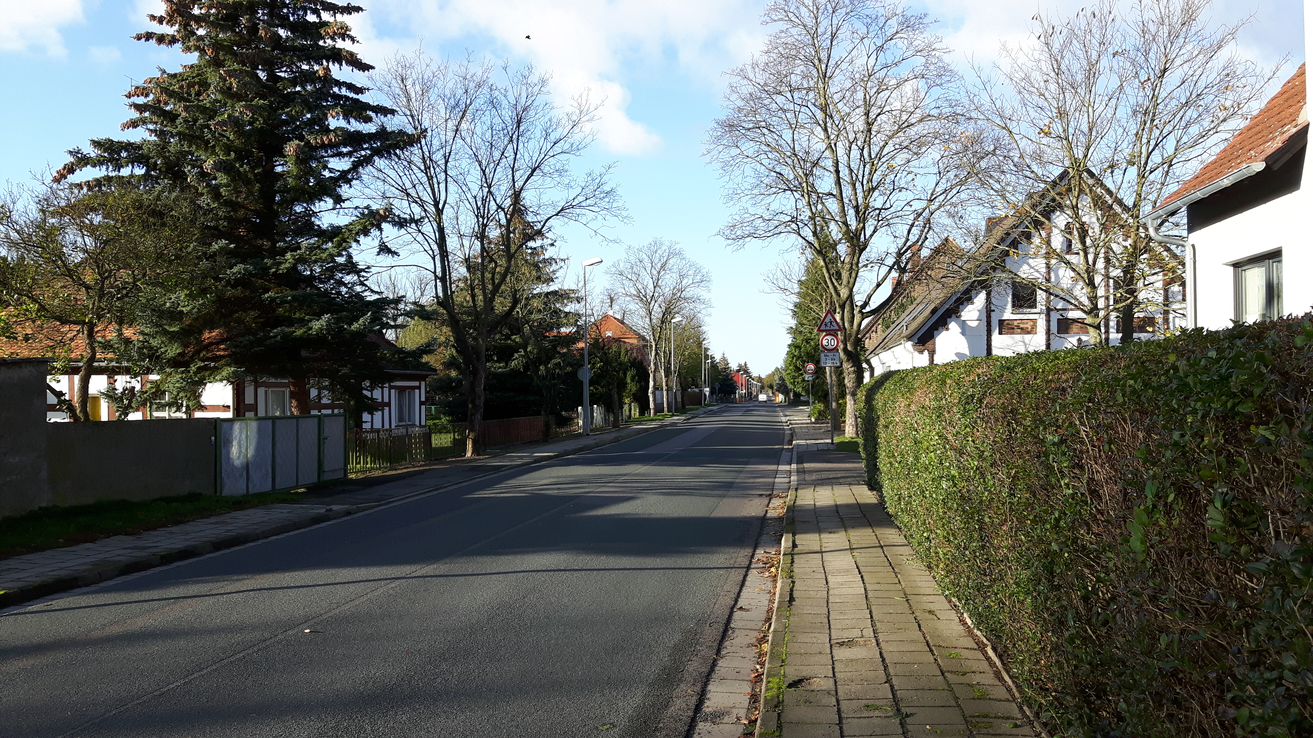 Groß Beuchow